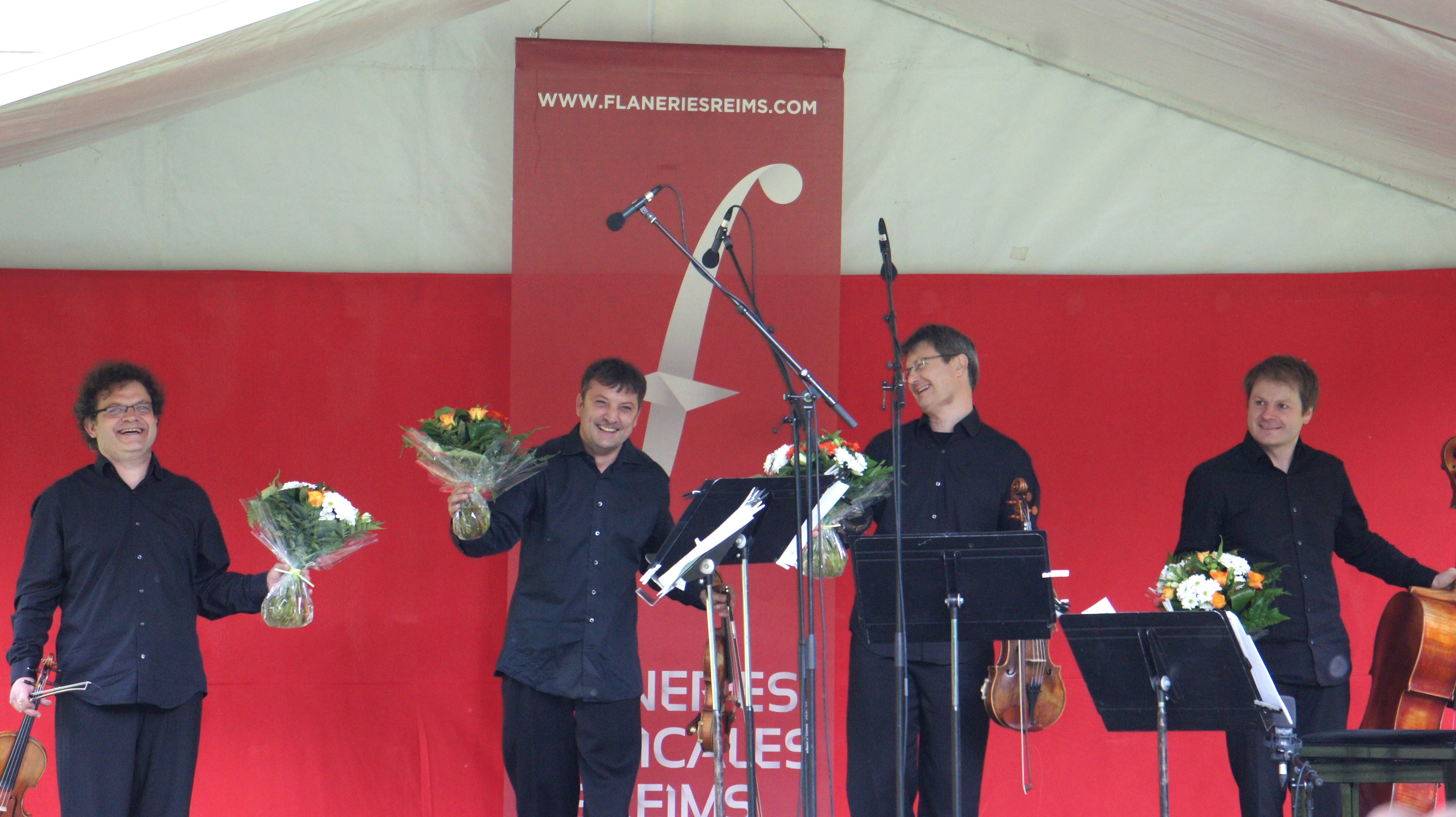 Le quatuor Debussy en concert au château de Saint-Brice.